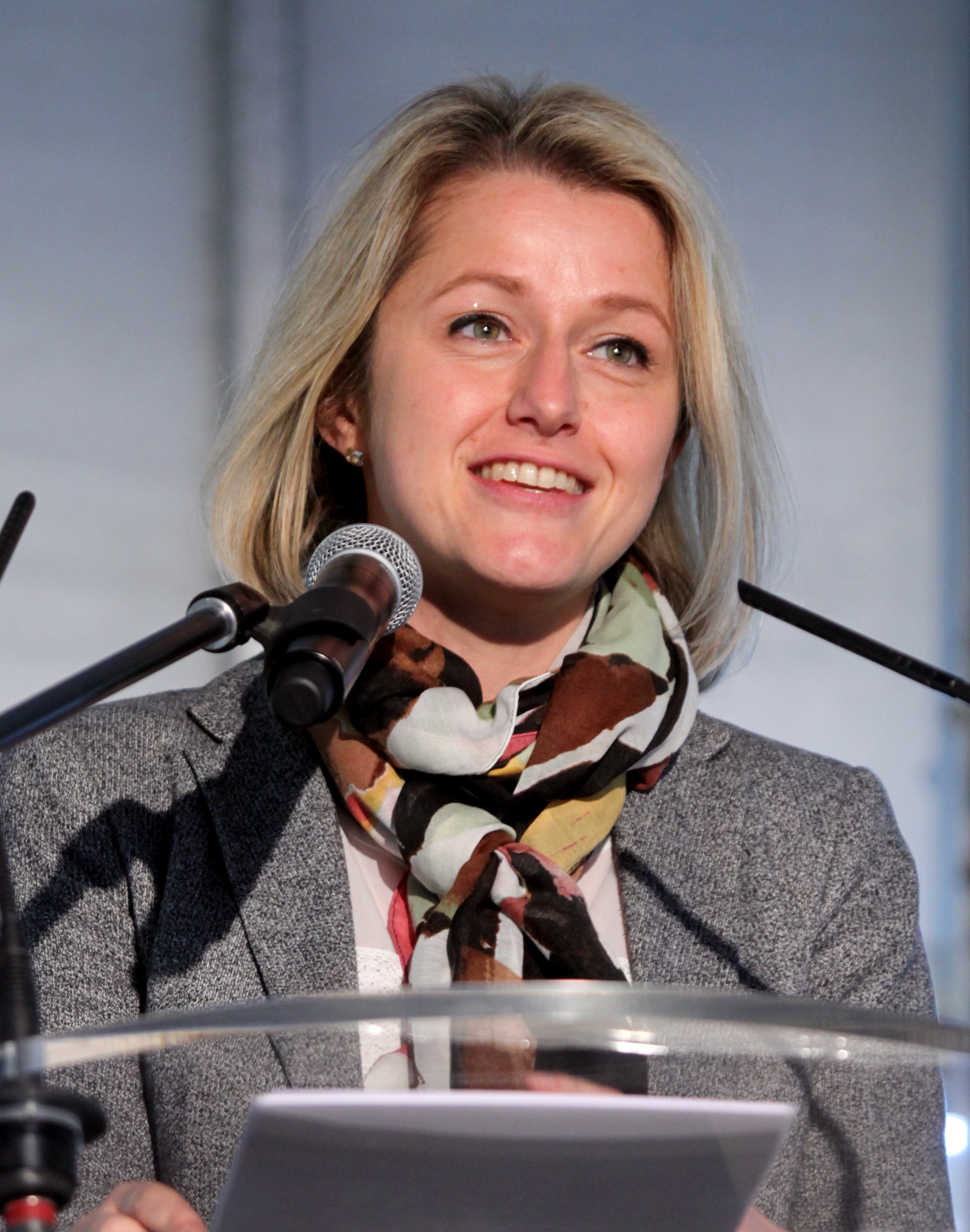 Barbara Pompili au 35e congrès des Réserves Naturelles de France à Salavas (07) le 8 avril 2016.